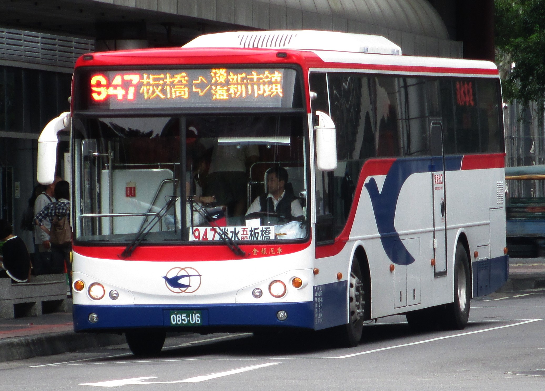 淡水客運085-U6 新北市區公車947線金龍高底盤巴士